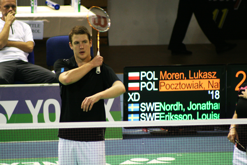 Mezinárodní mistrovství ČR v badmintonu